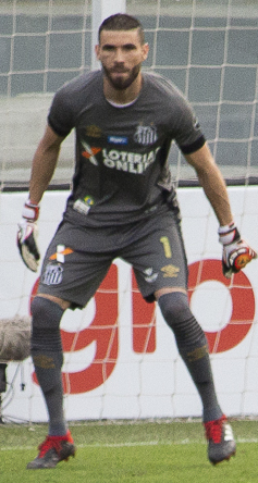 Foto: Douglas Teixeira/Futebol Santista